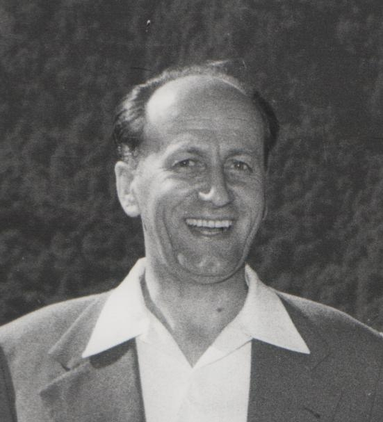 Koča Popović, Mijalko Todorović, Slobodan penezić Krcun na Sutjesci 1958.Foto Stevan Kragujević (po odobrenju kćerke Tanje Kragujević)